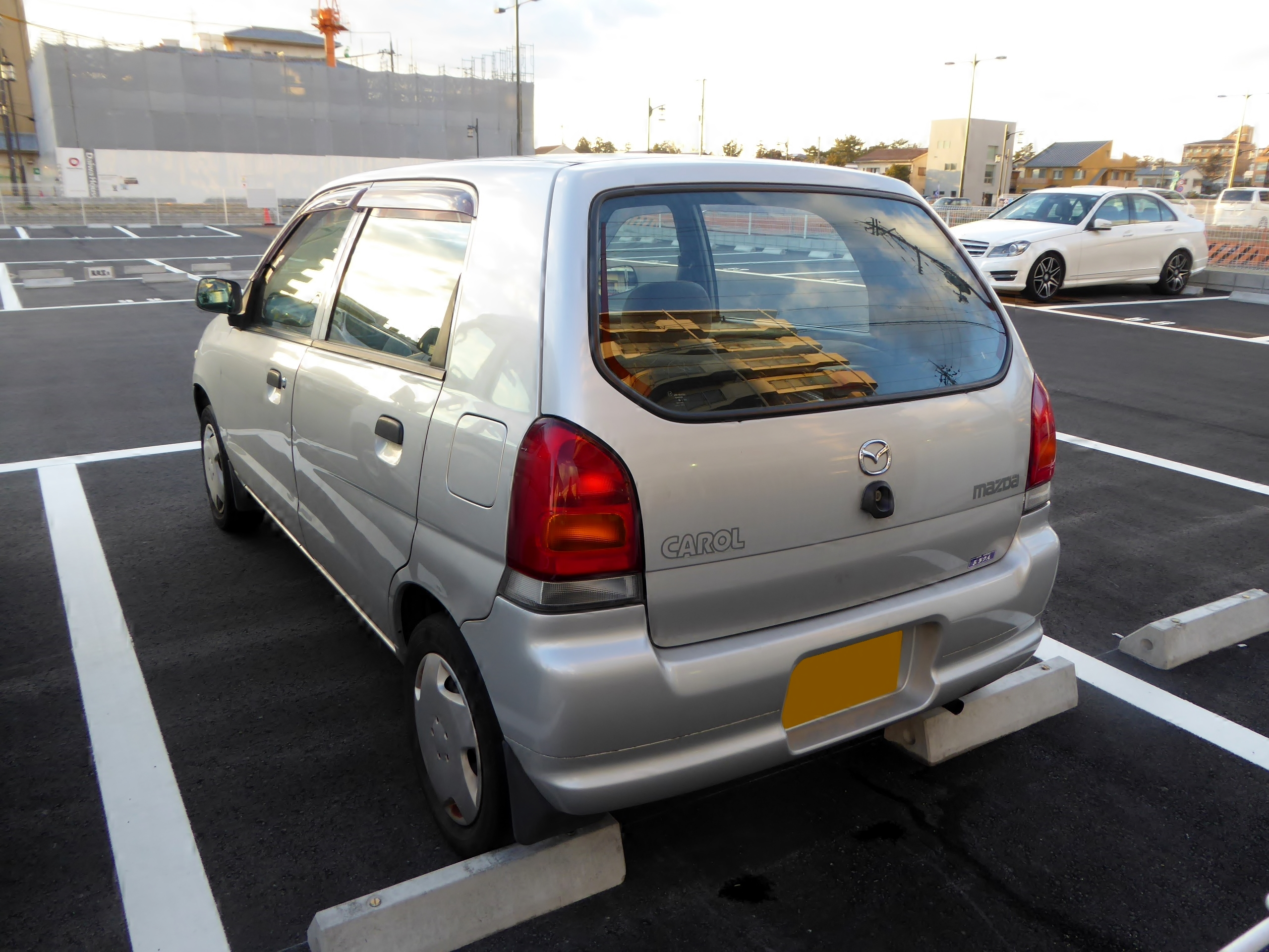 HB12S型マツダ・キャロルSGをリアから撮影。